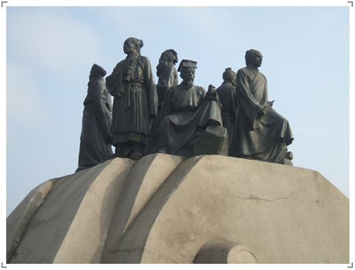 七贤群雕像